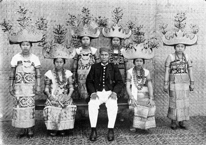 Negatief. Portret van een voornaam hoofd met dansmeisjes uit Lampong in vol ornaat